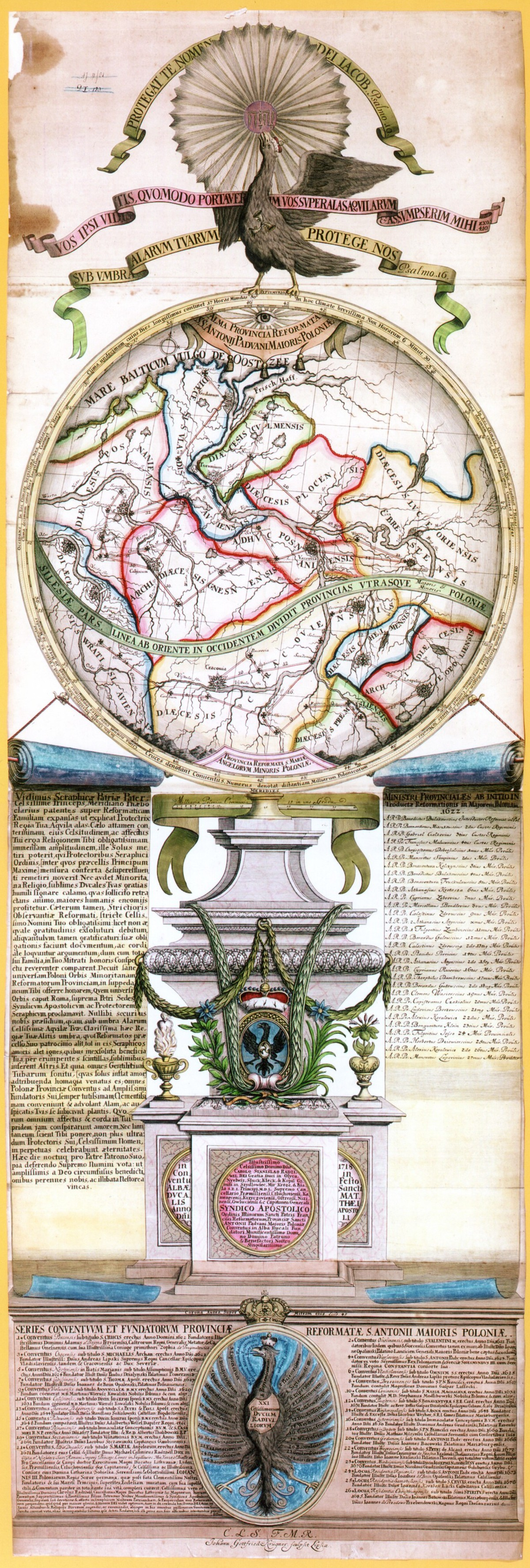 Mapa ozdobna, zawiera dane astronomiczne, wykazy fundatorów kościelnych w Wielkopolsce i Małopolsce itp. Na trzech arkuszach podłużnych, po bokach wykazy klasztorów i ich założycieli, tudzież przełożonych z wyrażeniem dat.